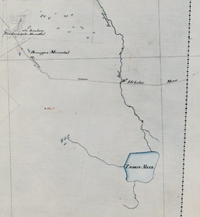 Fragment kaart van het zuidoostelijk deel van de provincie Drenthe met het verdwenen Zwarte Meer